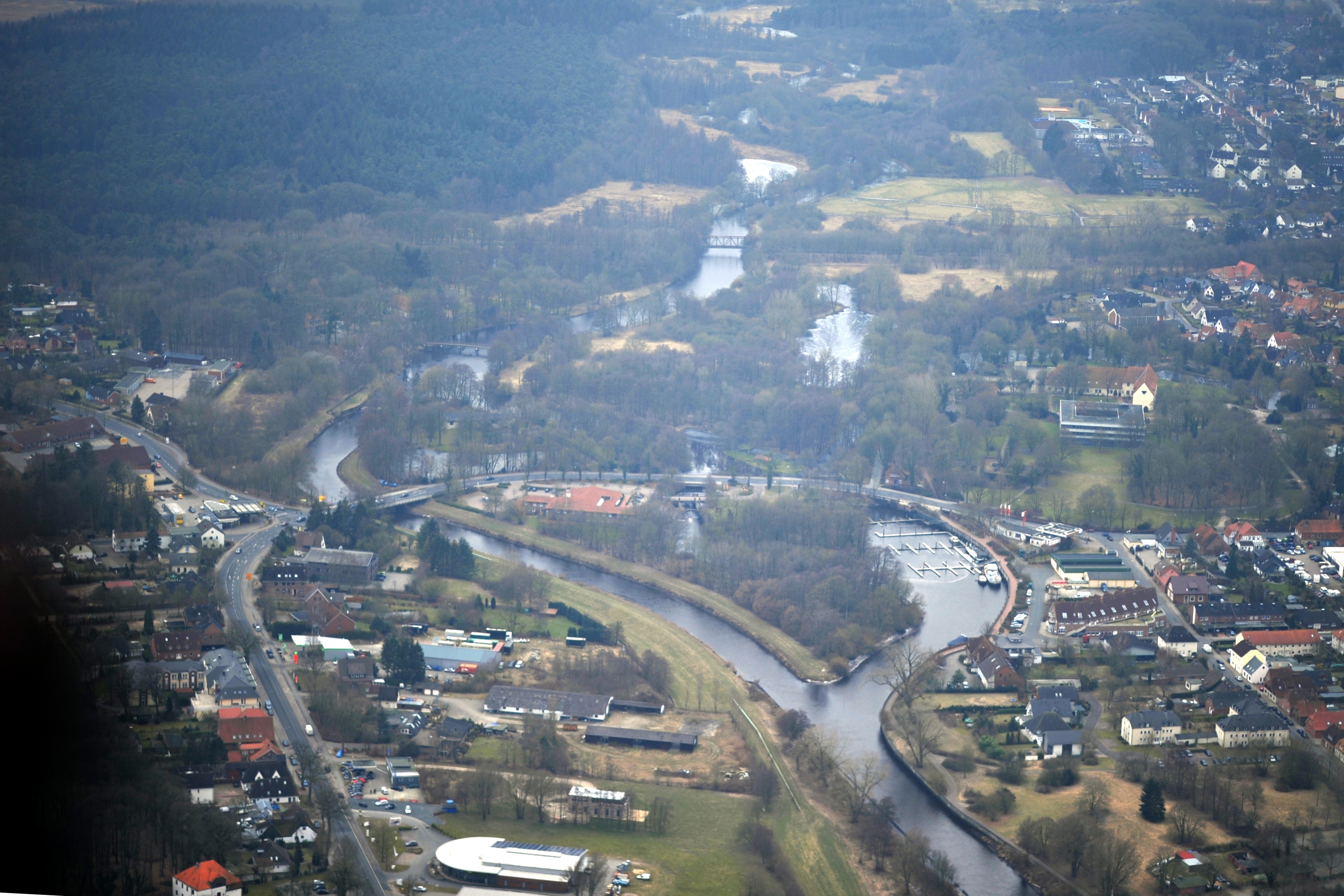 Fotoflugkurs Cuxhaven 2013: Hafen Bremervörde